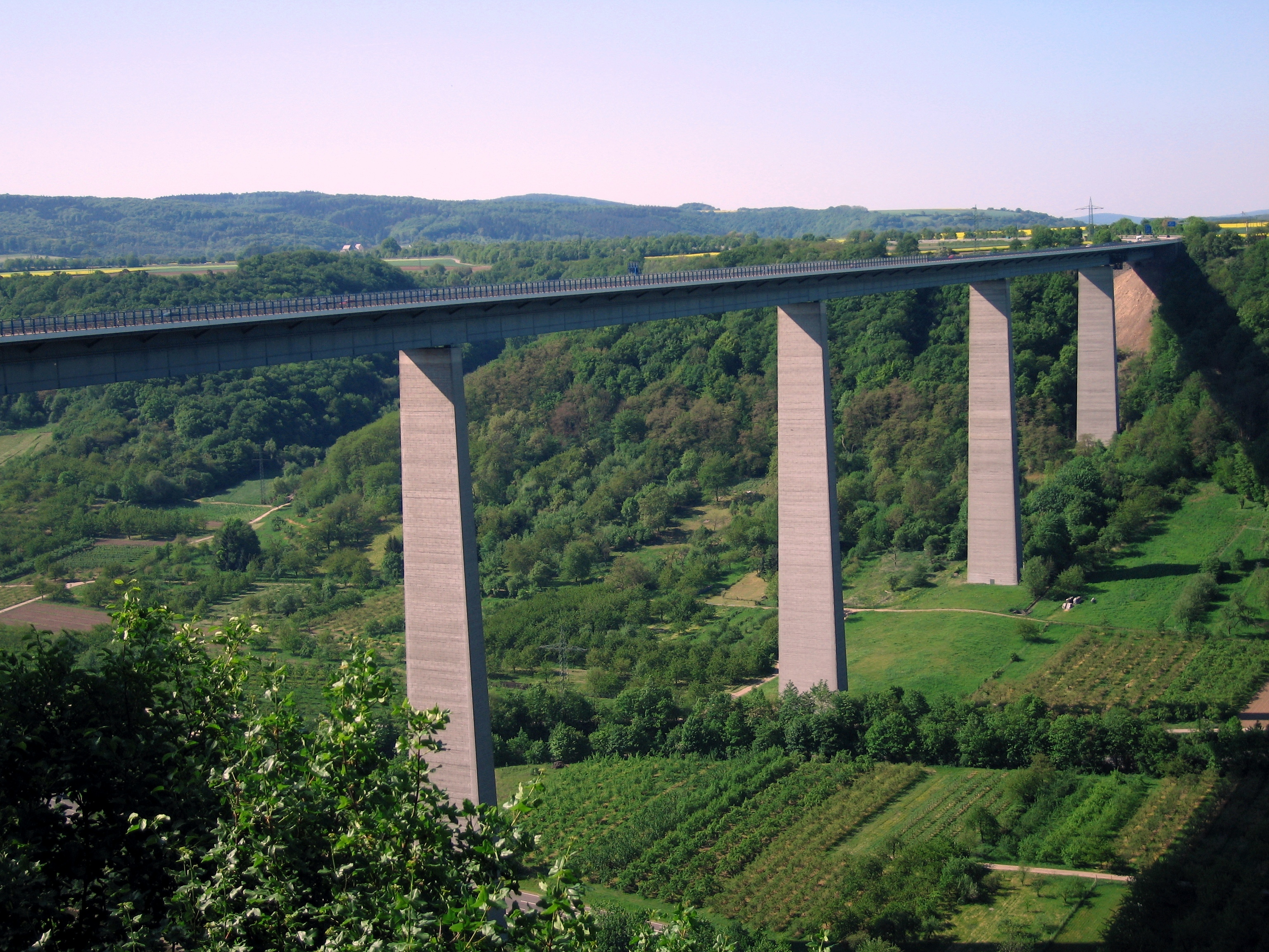 Moseltalbrücke